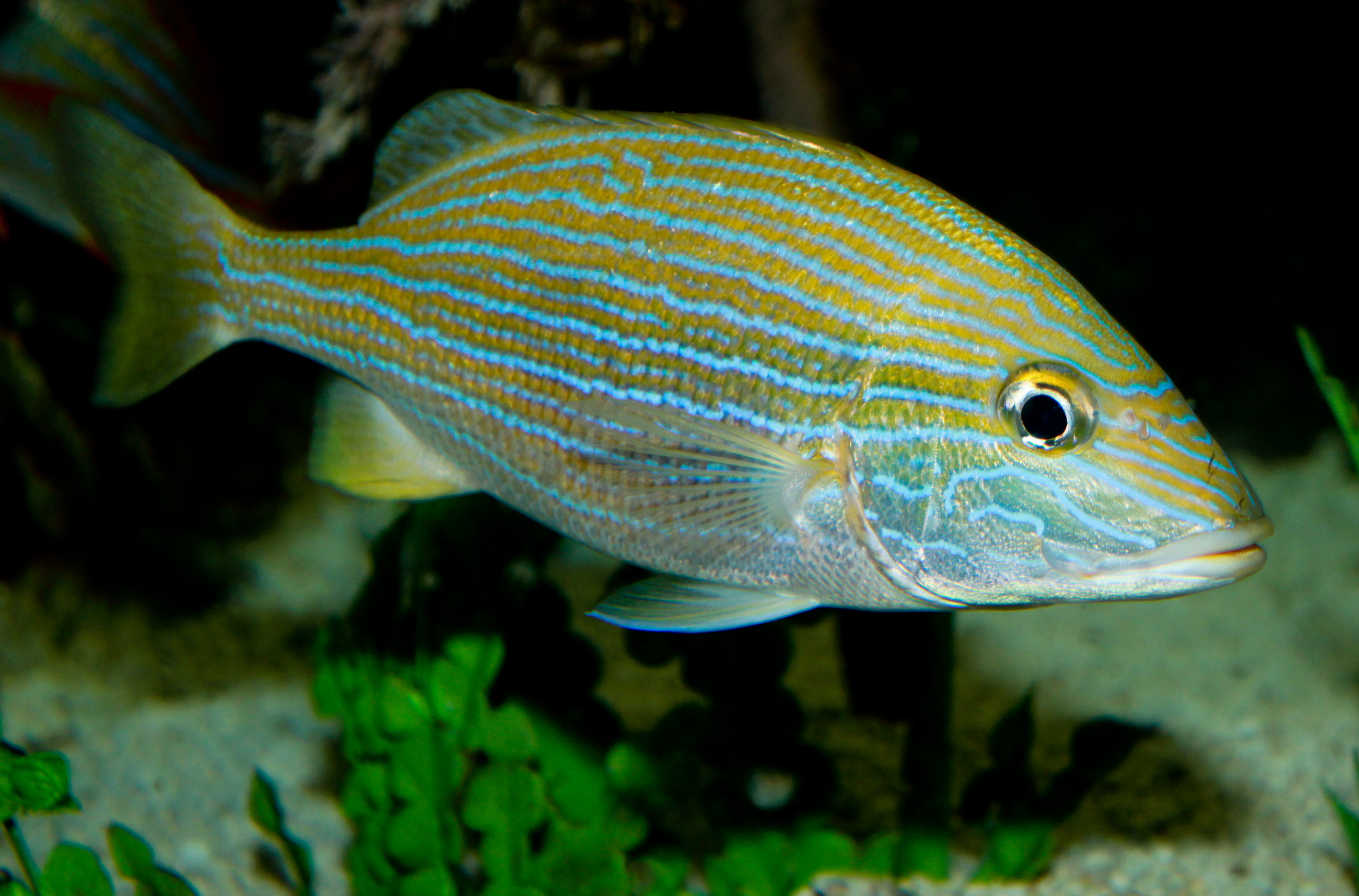 Blue Stripe Grunt. Haemulon sciurus